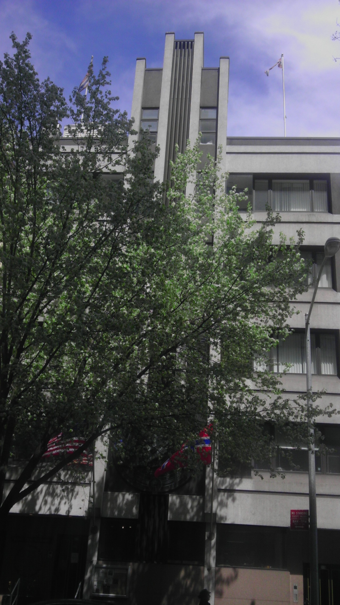 Olav v Norwegian church